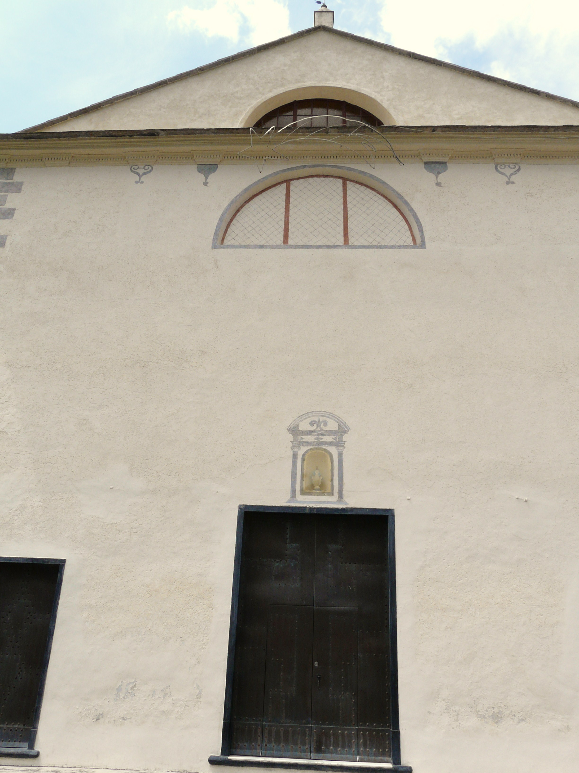 Chiesa di San Giovanni Battista, Nasino, Liguria, Italia